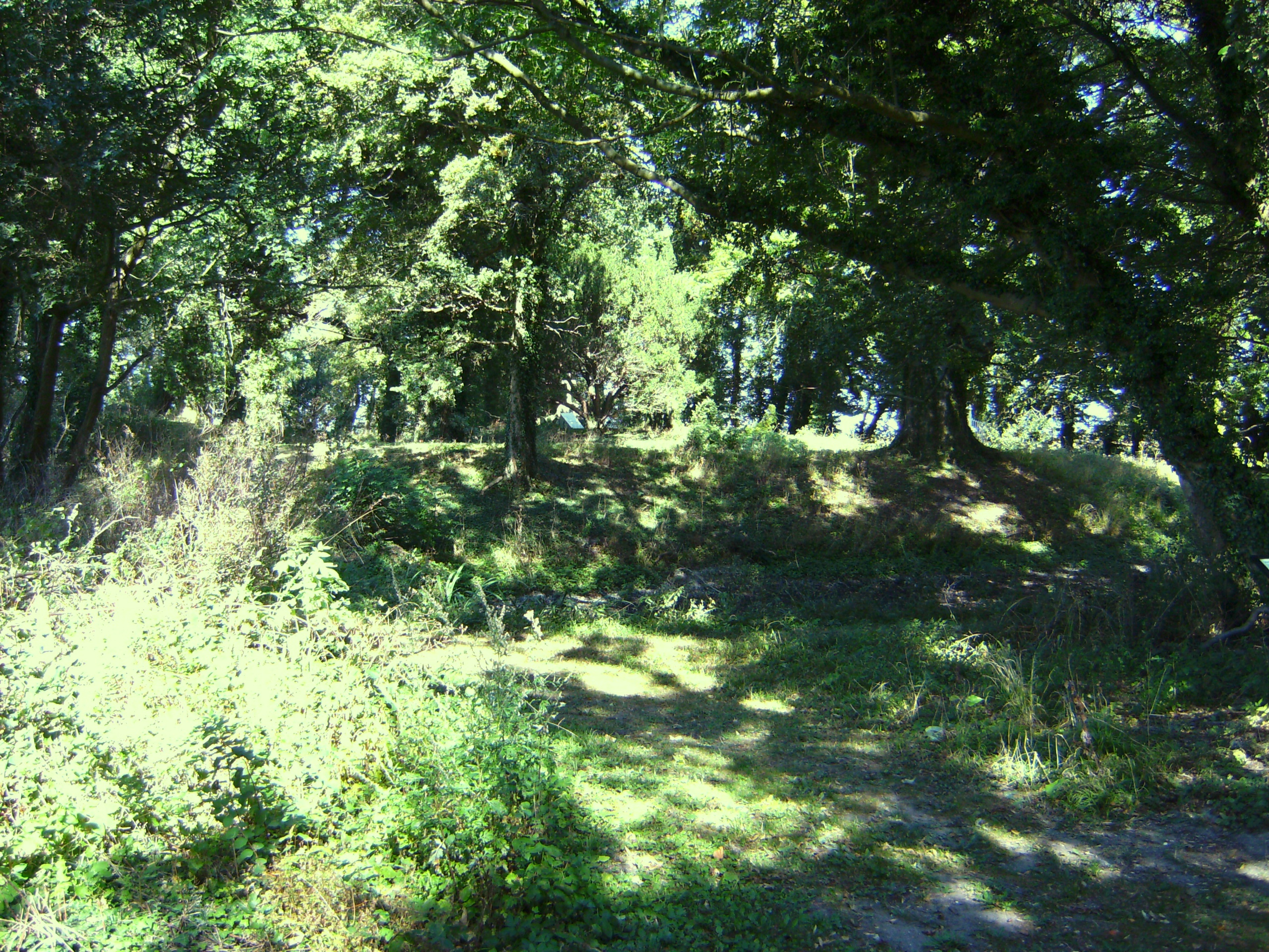 Gammelholm er et voldsted og en privat gravplads tæt på Fuglsang mellem Nykøbing F og Nysted på Østlolland Remains af an old fortress, Lolland, Denamrk